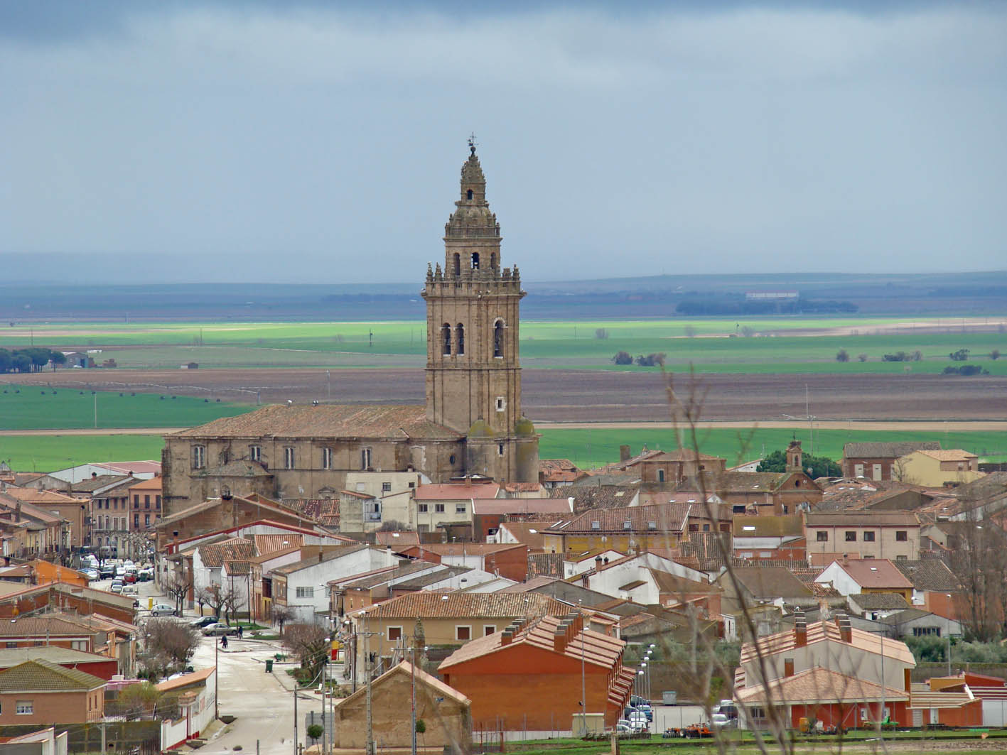 Nava del Rey, provincia de Valladolid, España. Vista del pueblo con la iglesia de los Santos Juanes al fondo.